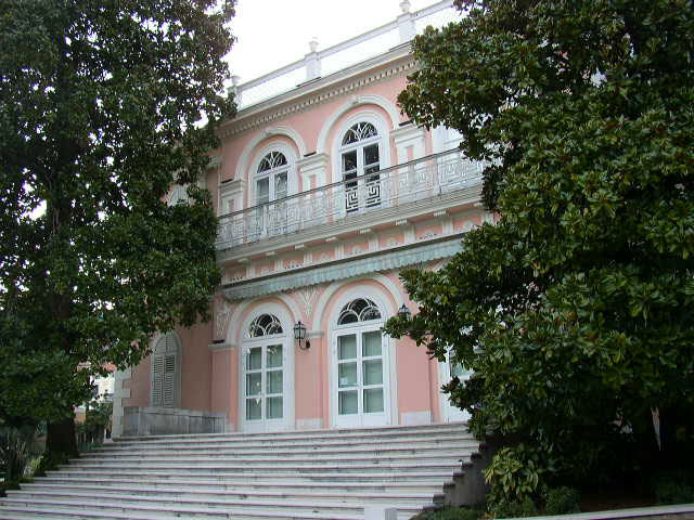 Villa Angiolina in Opatija